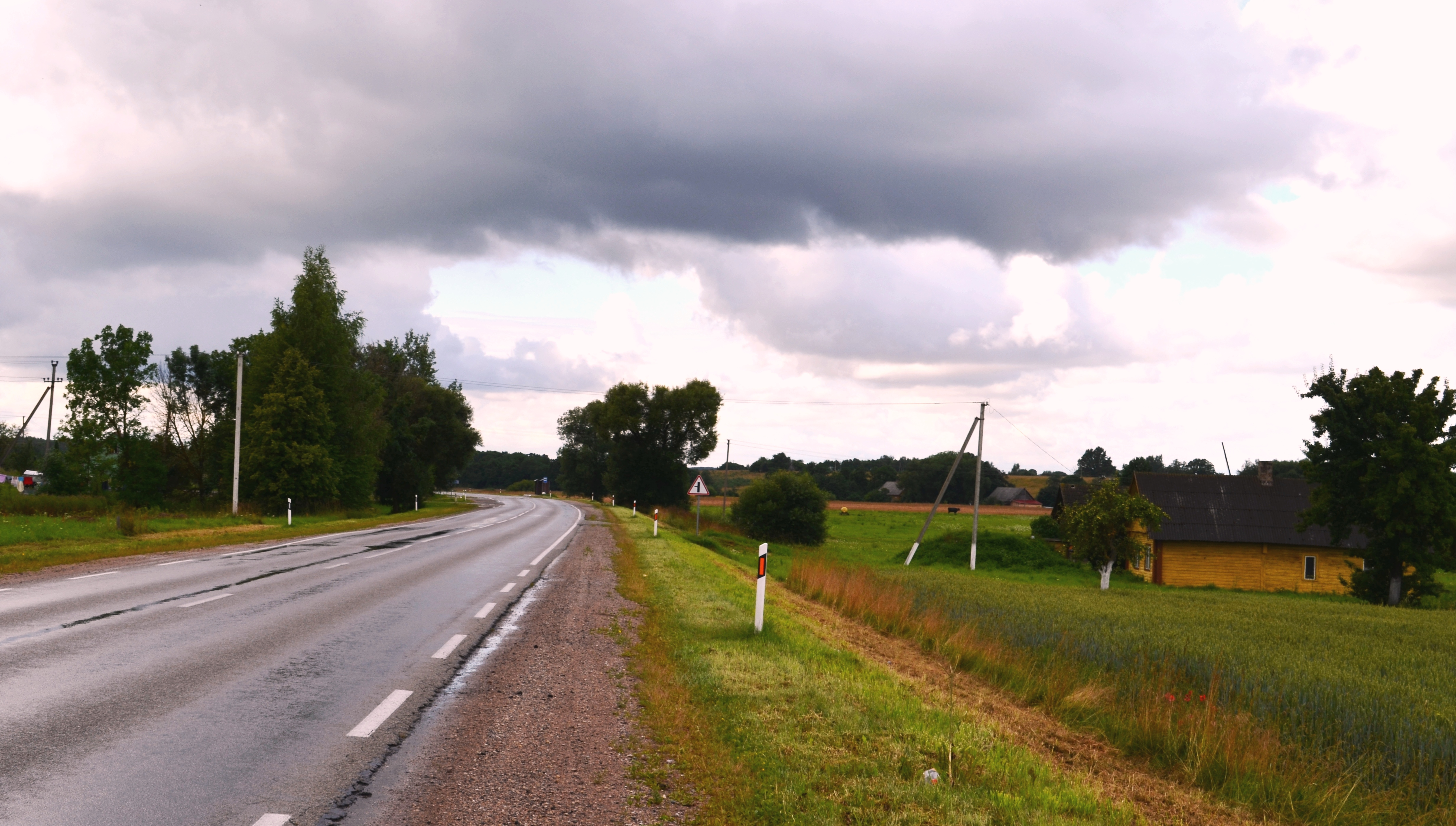 Naujarodžiai, Panevėžio raj.